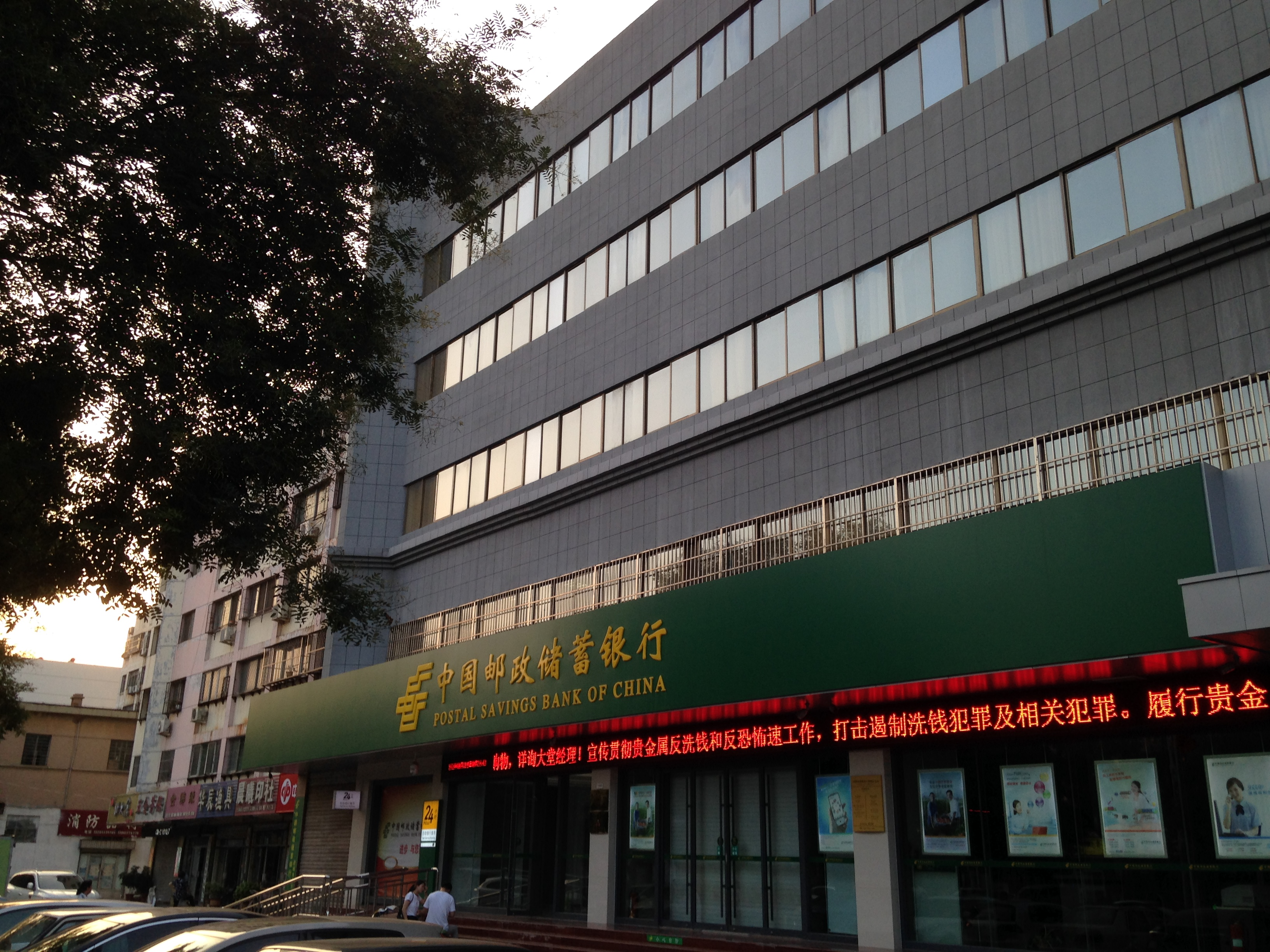 中文（中国大陆）: 肥城市照片